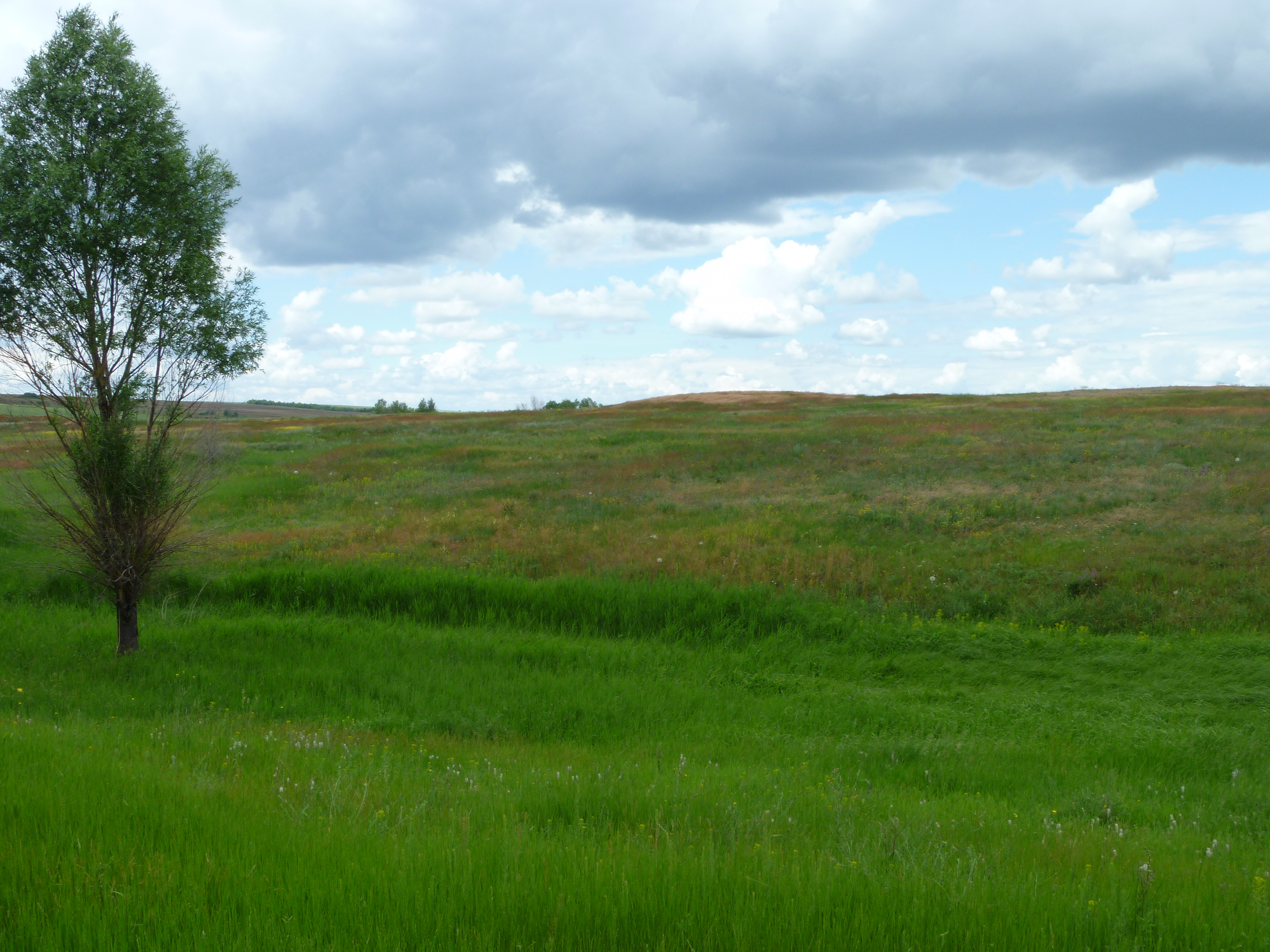 Гозефсталъ (Скрышалевъ)